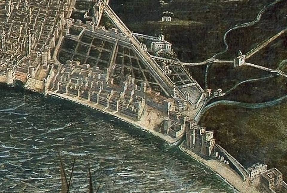 Didier Barra - Dipinto che ritrae la città di Napoli in tutta la sua estensione. Particolare della zona orientale con il Castello del Carmine, le mura aragonesi, il Ponte della Maddalena.